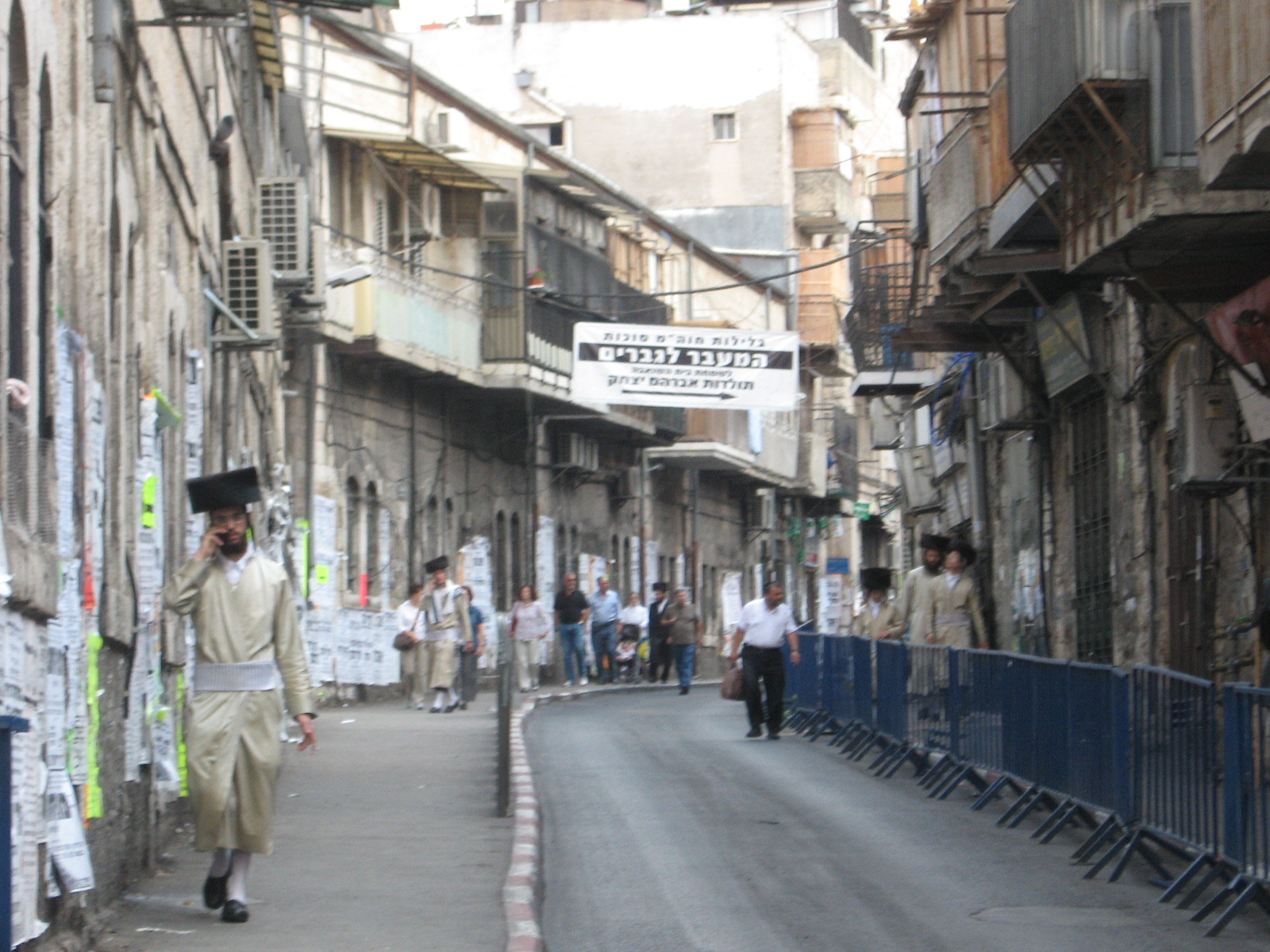 רחוב מאה שערים